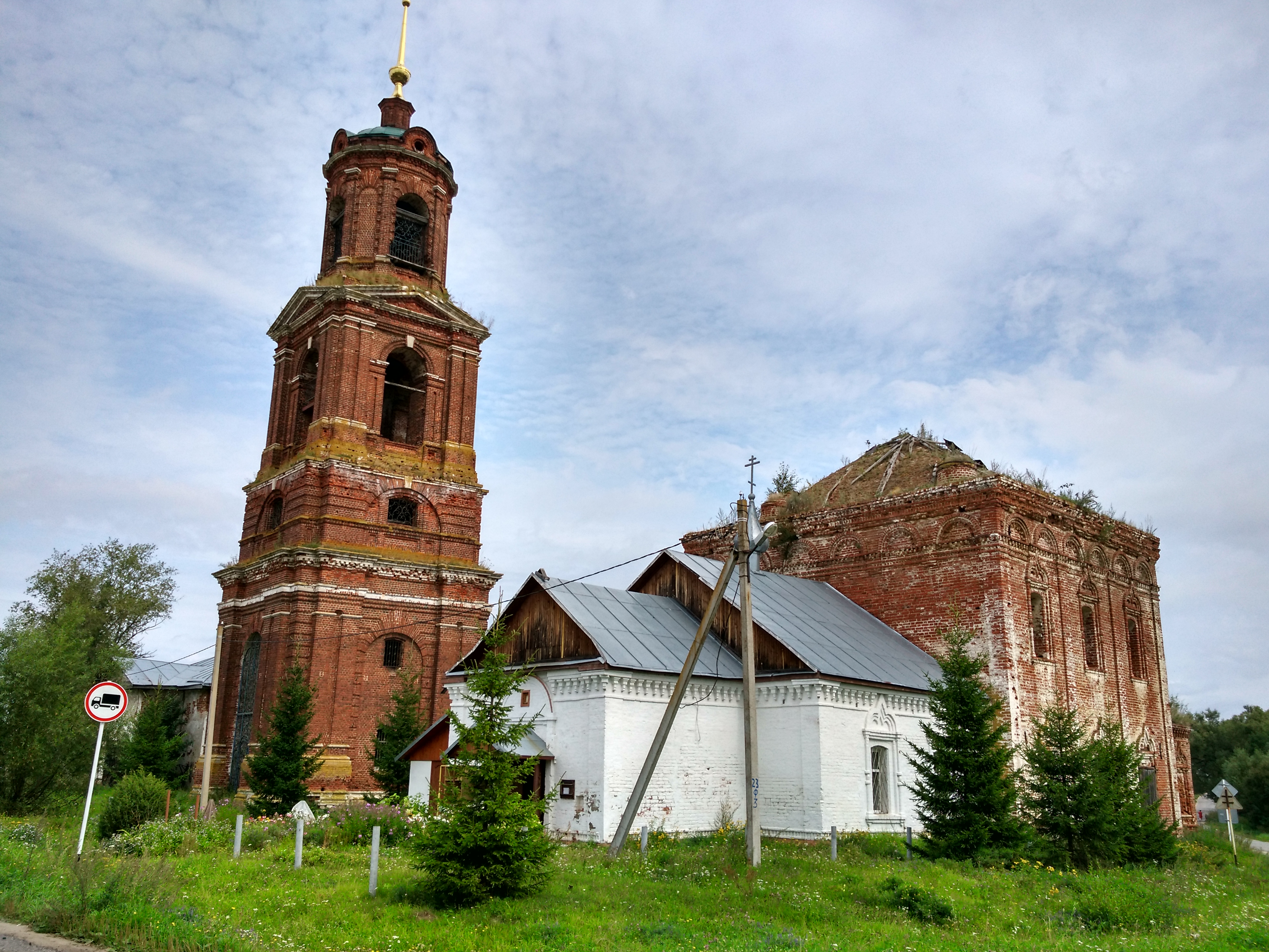 Церковь святителя Николая: Торчино, Суздальский район, Владимирская область